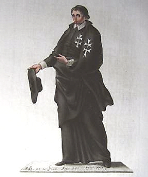 Habit des Heilig-Geist-Ordens mit Patriarchenkreuz (1786)